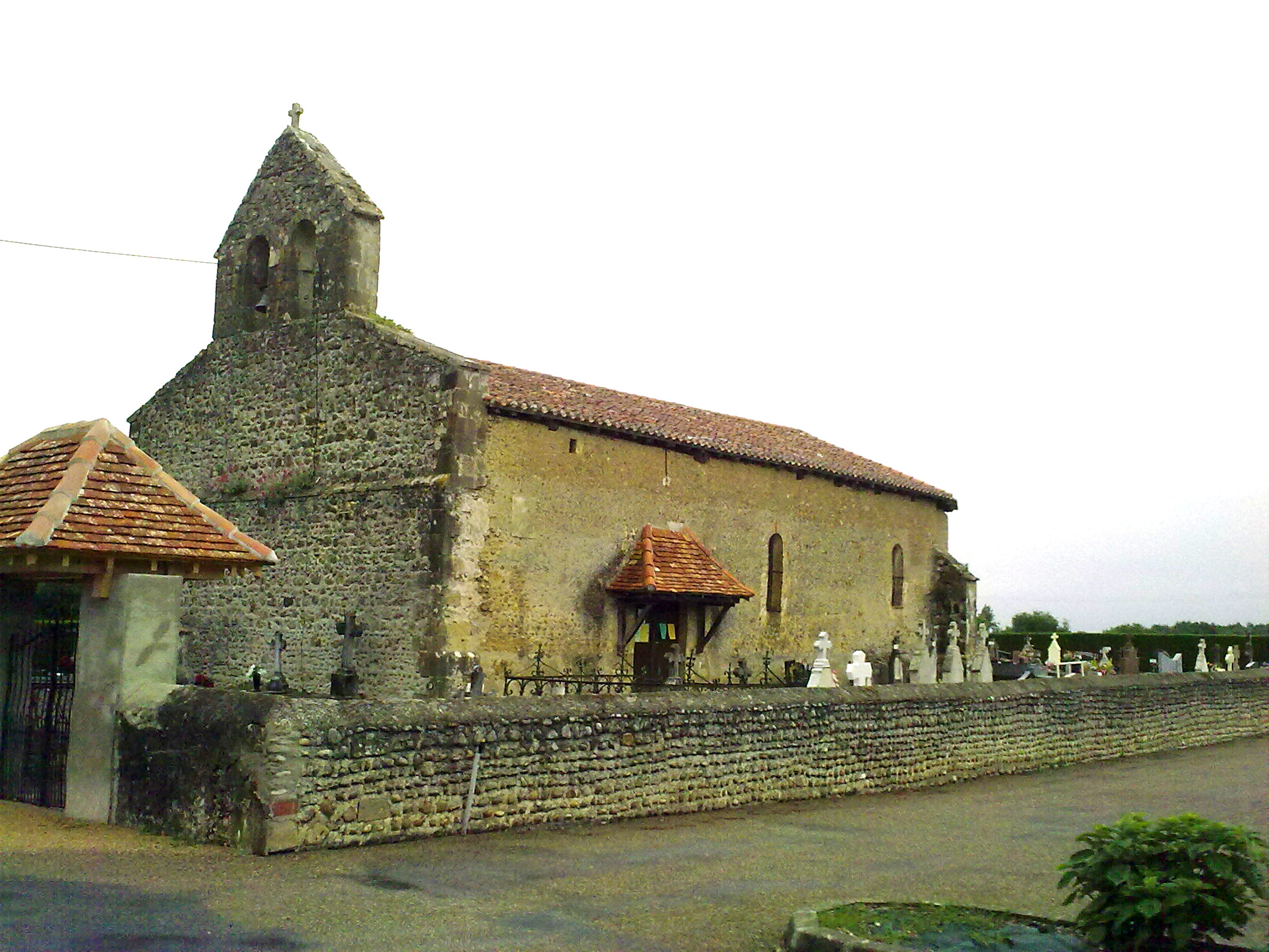 Sarron (Landes)